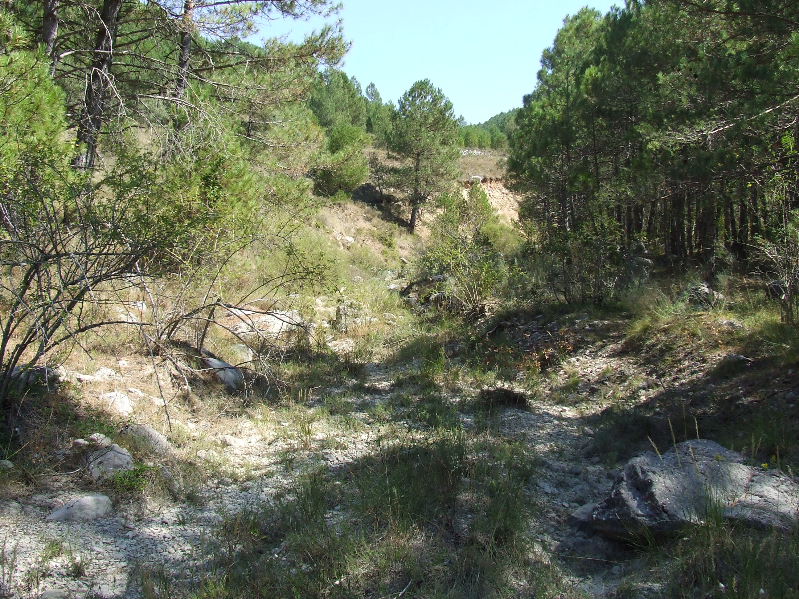 El riu d'Abella (Abella de la Conca, Pallars Jussà)